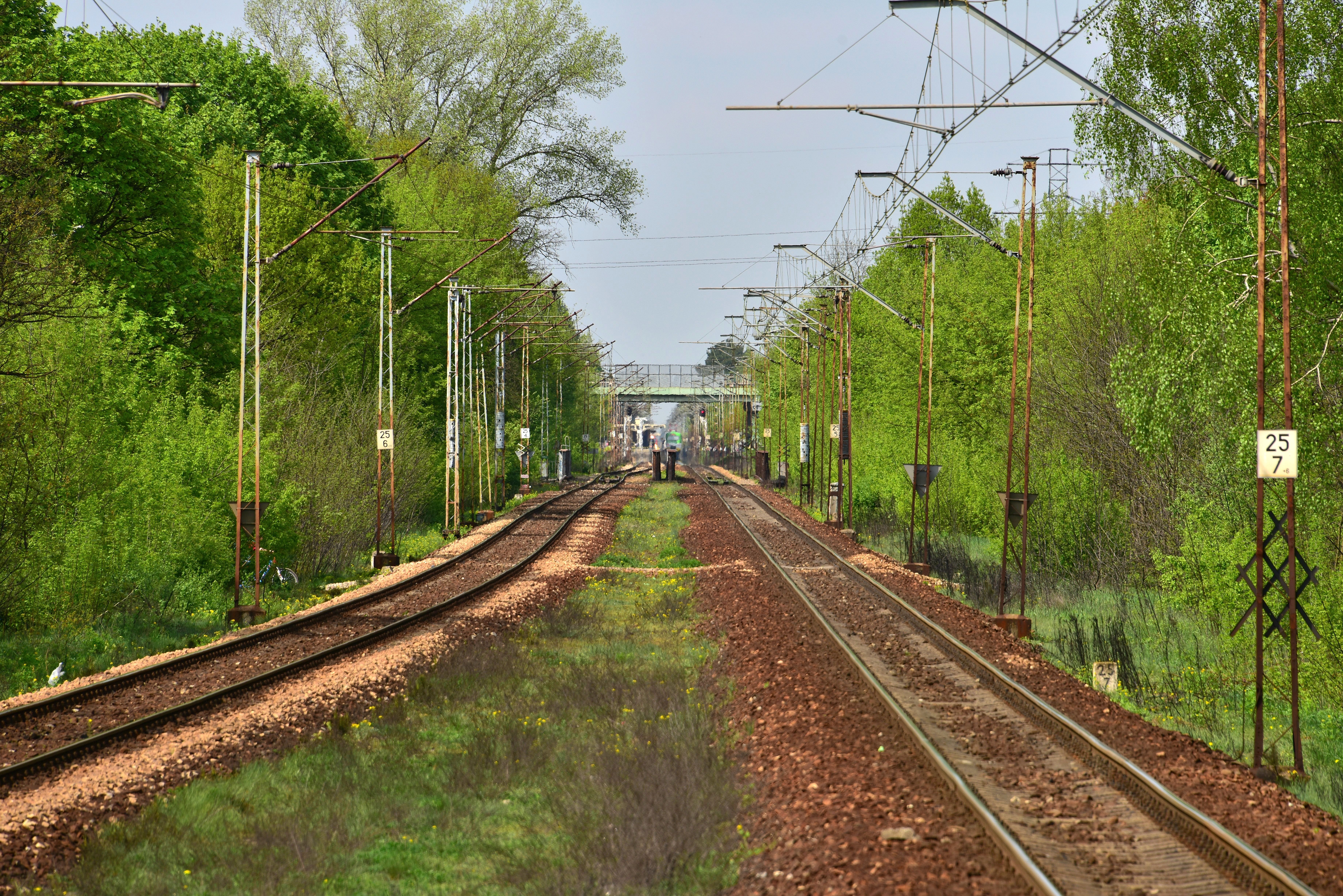 Linia kolejowa nr 7 między Józefowem i Świdrem